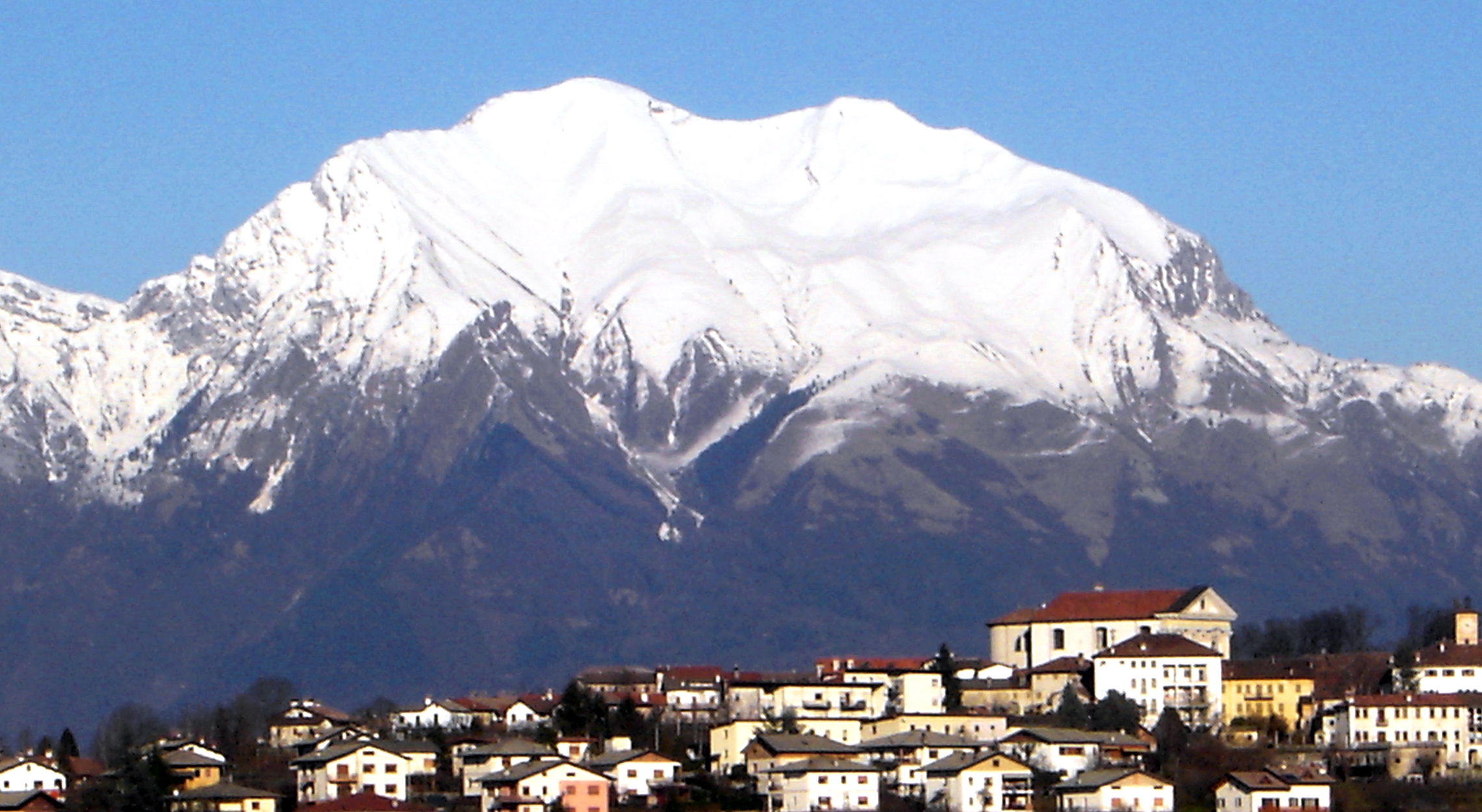 foto scattada da Armandoria il 23/01/2008 GFDL